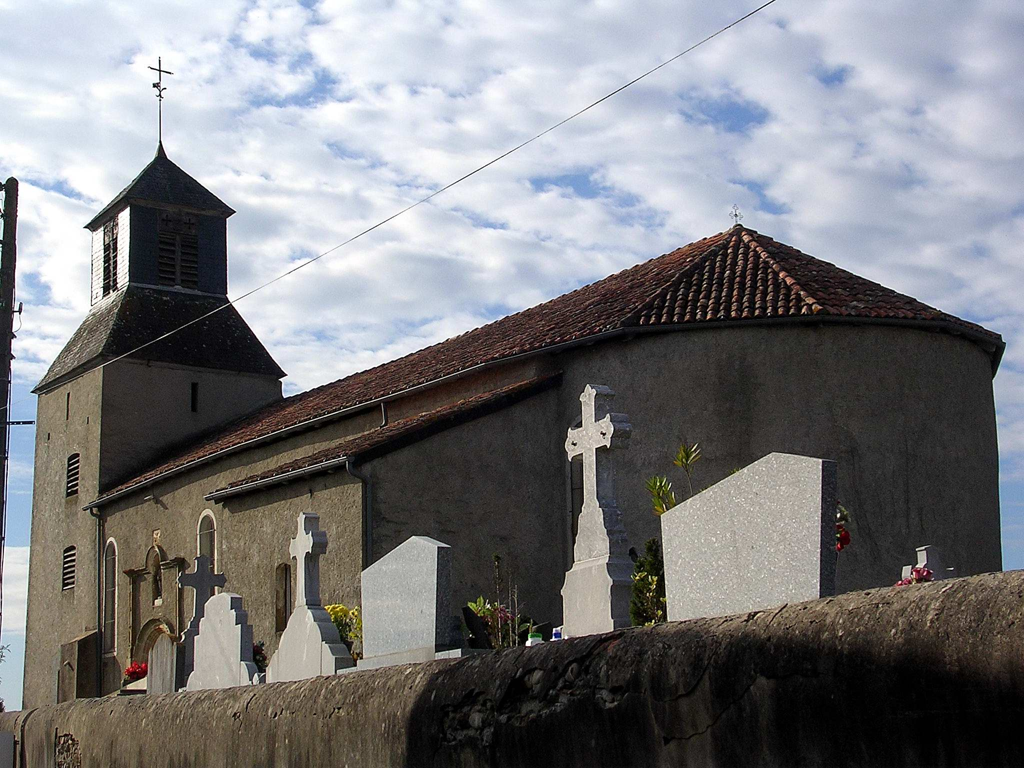 Église Saint-Pierre d'Athos-Aspis